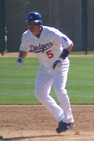 Mark Loretta